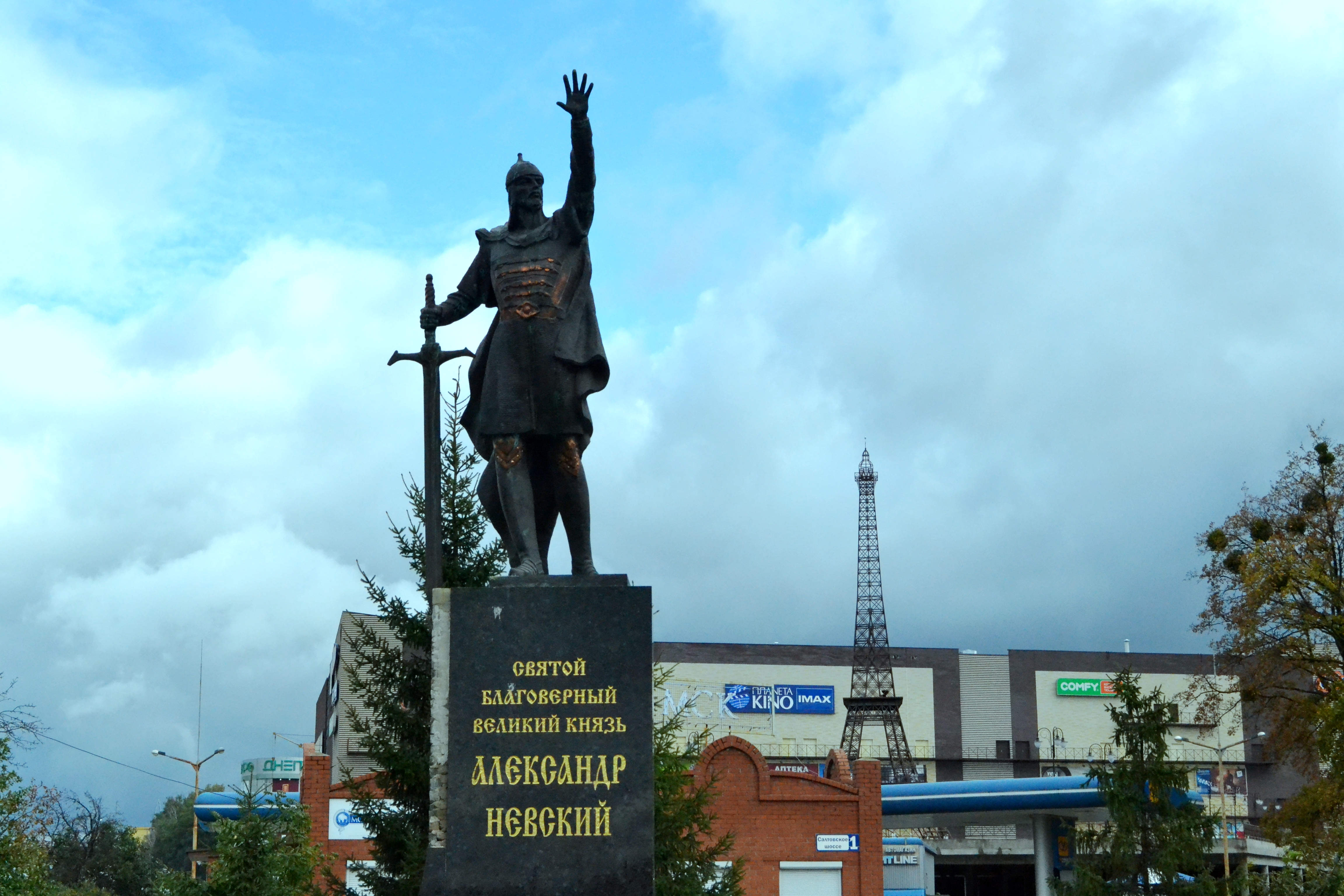 Памятник Александру Невскому возле храма